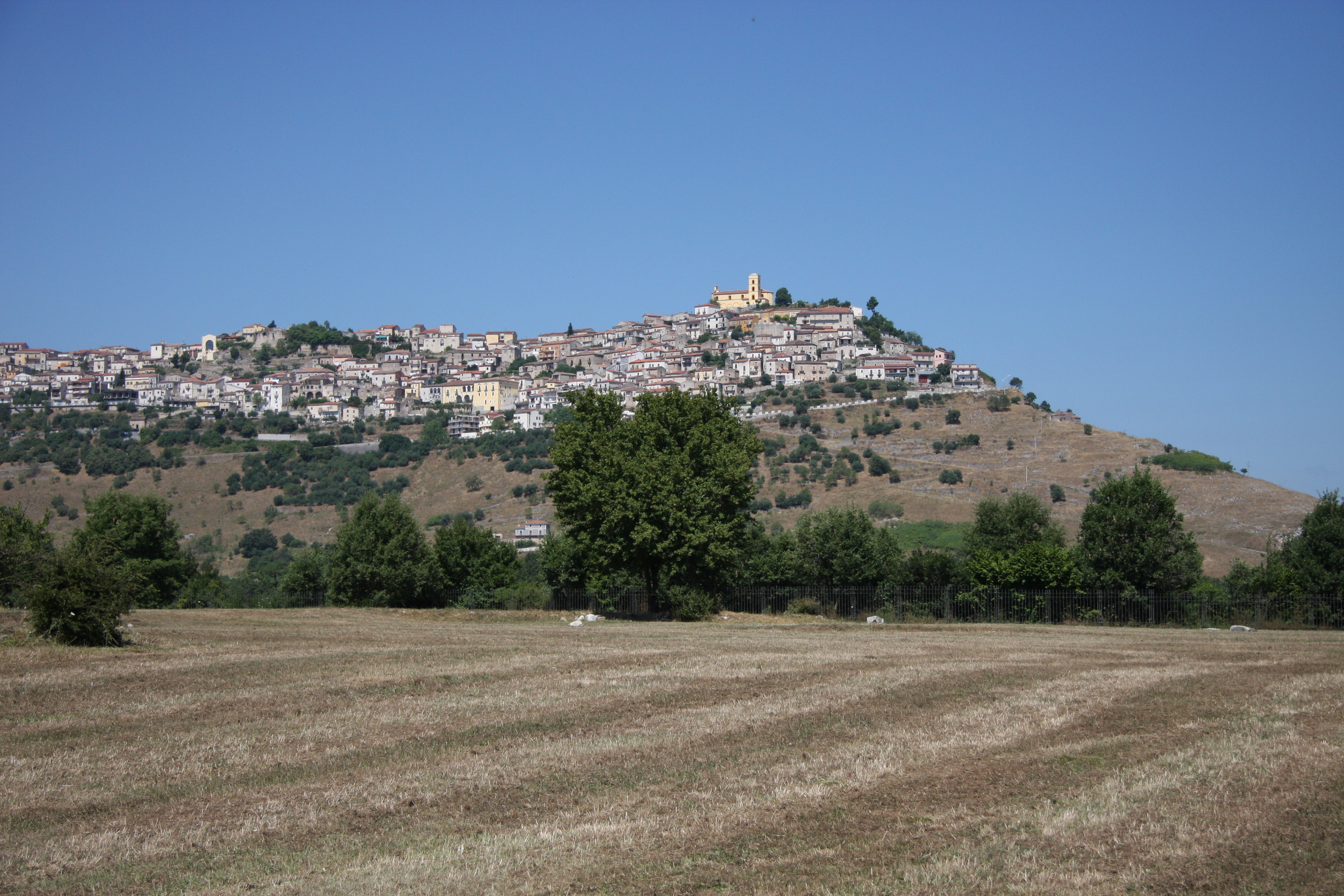 Panorama di Grumento Nova (Basilicata)